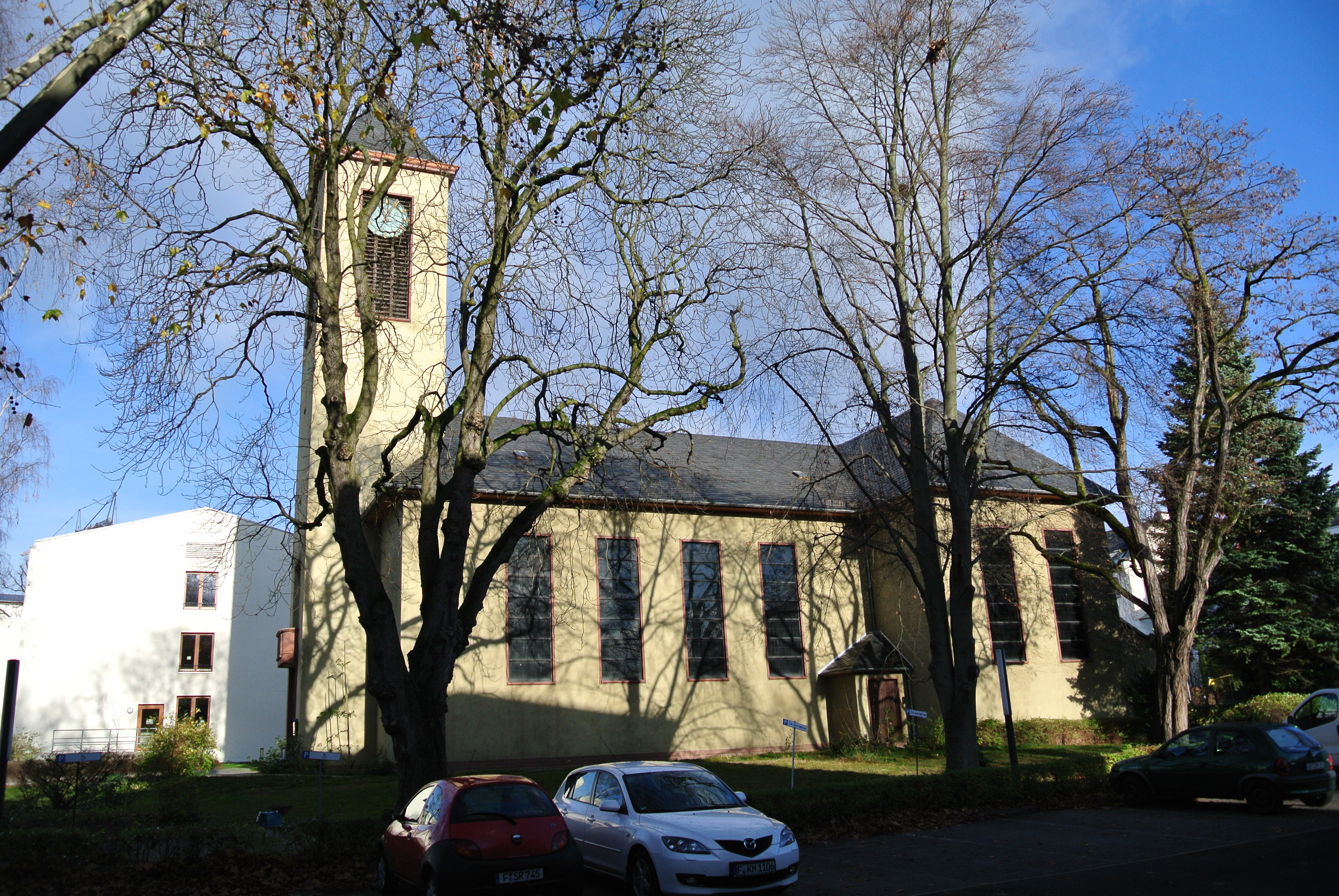 Diakonissenkirche in Frankfurt-Nordend, Holzhausenstraße, Südansicht